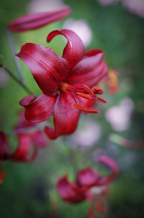 Lilium 'Red Velvet'